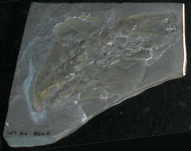 Laggania cambria fossil in the Royal Ontario Museum, Toronto.